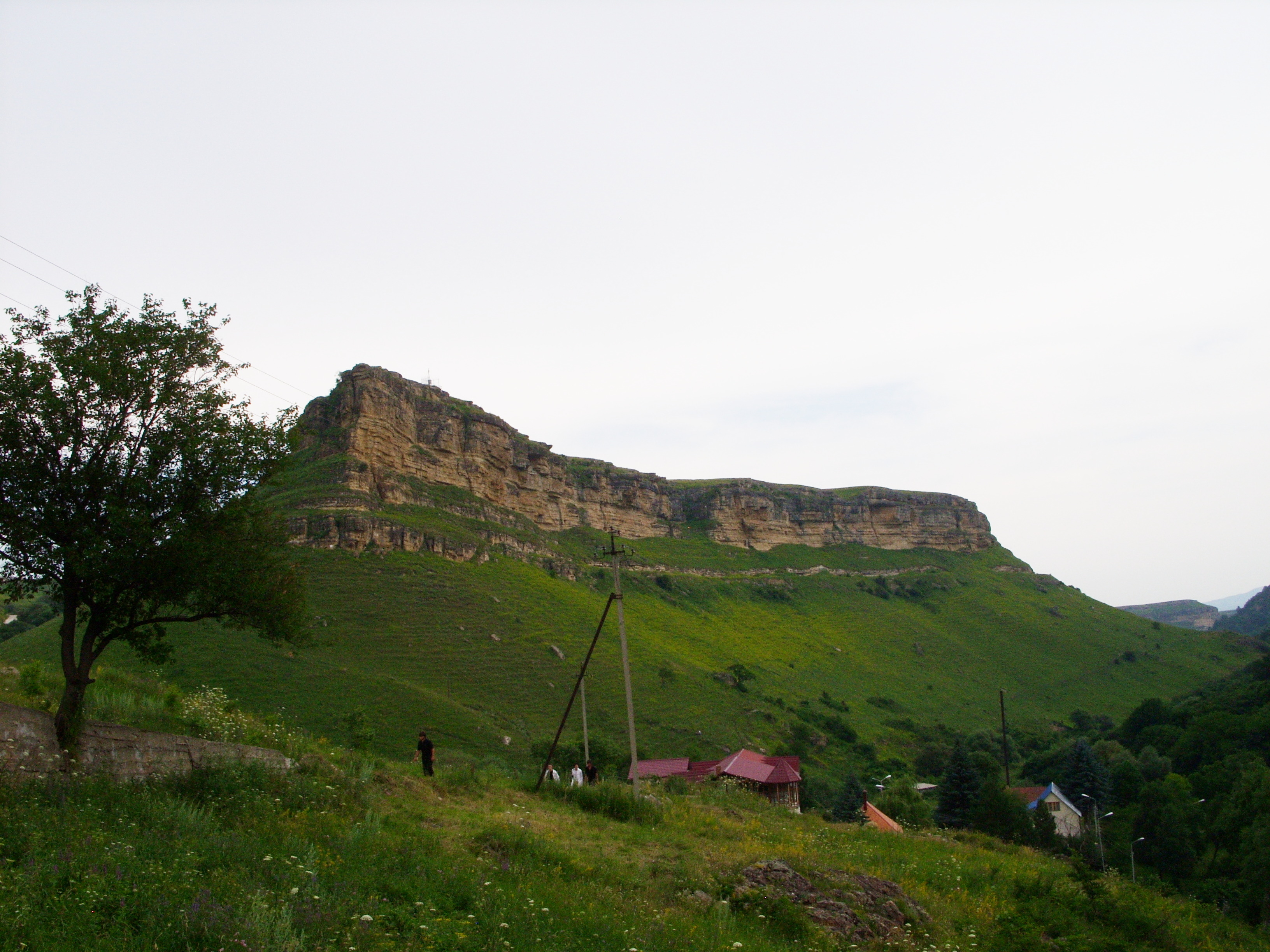 Малокарачаевский район Карачаево-Черкесии. Снимки июля 2009 г. Экскурсия из Железноводска